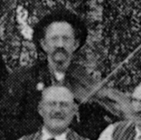 August strömberg vid spelmanstävlingen i Värnamo 1928